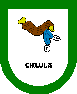 Escudo de San Andrés Cholula